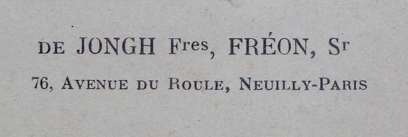 Signature commerciale des photographies de l'atelier photographique Louis Fréon (après 1904), successeur de DE Jongh frères (1879-1904) à Neuilly-sur-Seine (Hauts-de-Seine, France). Détail d'un document original.